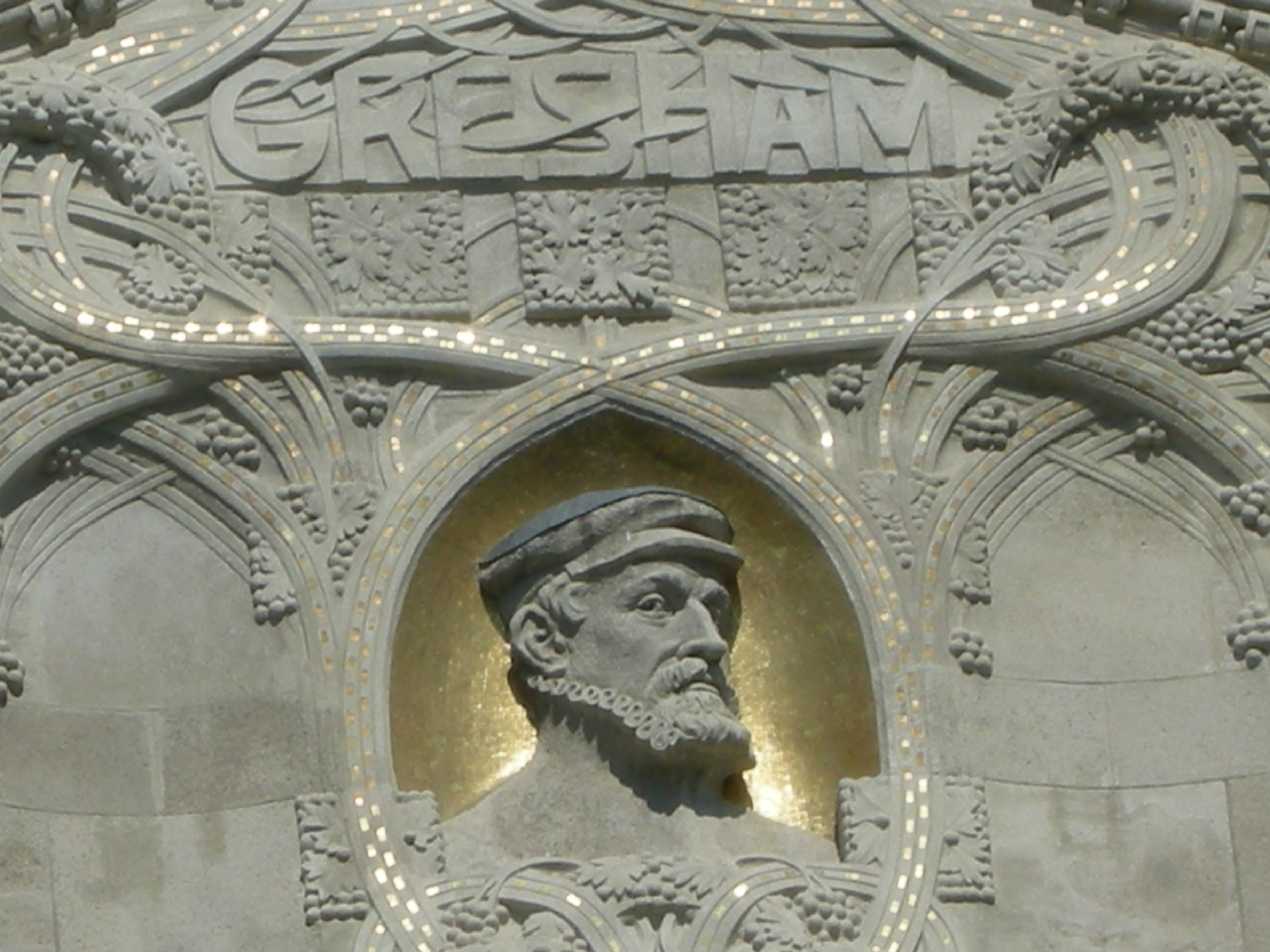 Budapest